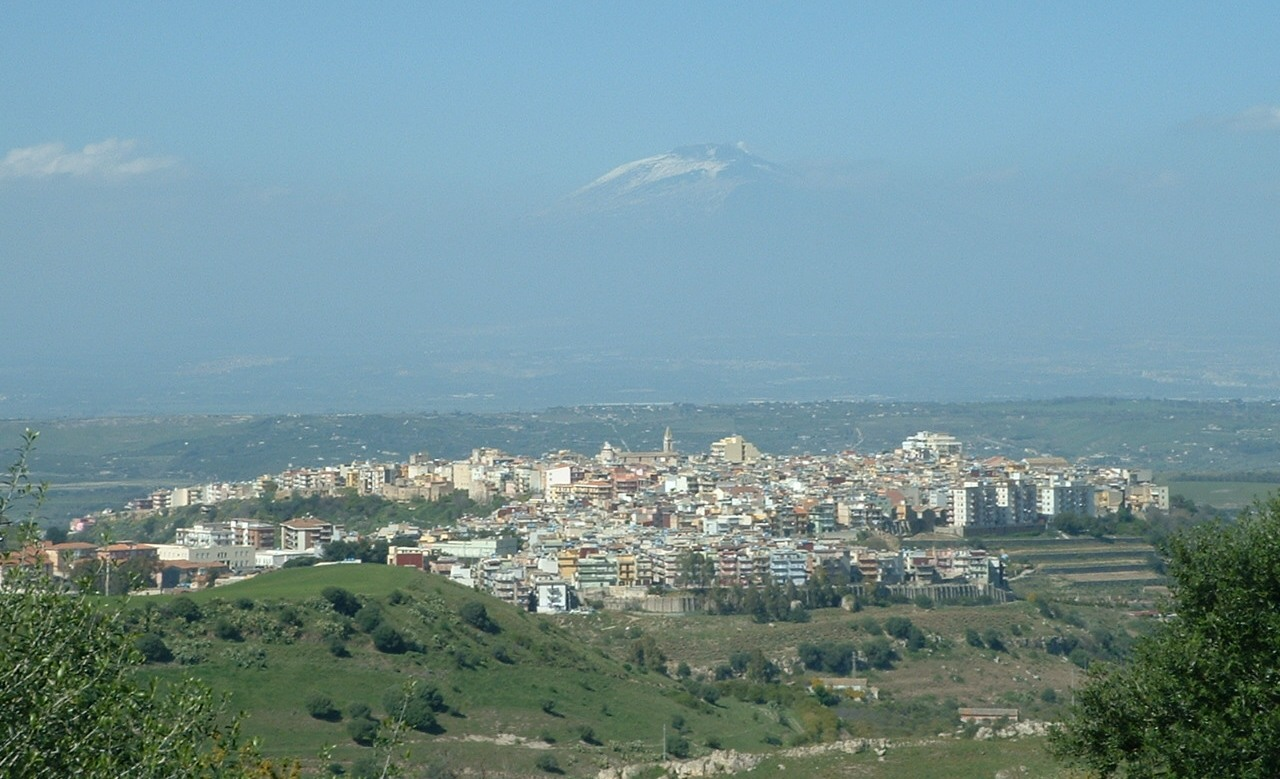 Carlentini (SR), View from Pedagaggi.